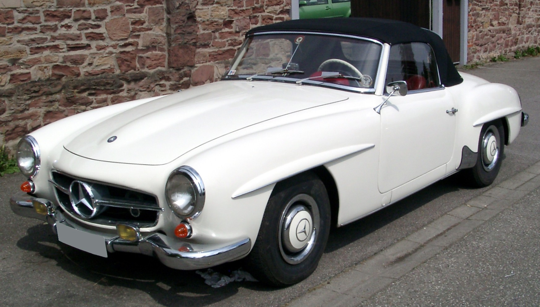 Mercedes-Benz 190 SL (W 121 BII)